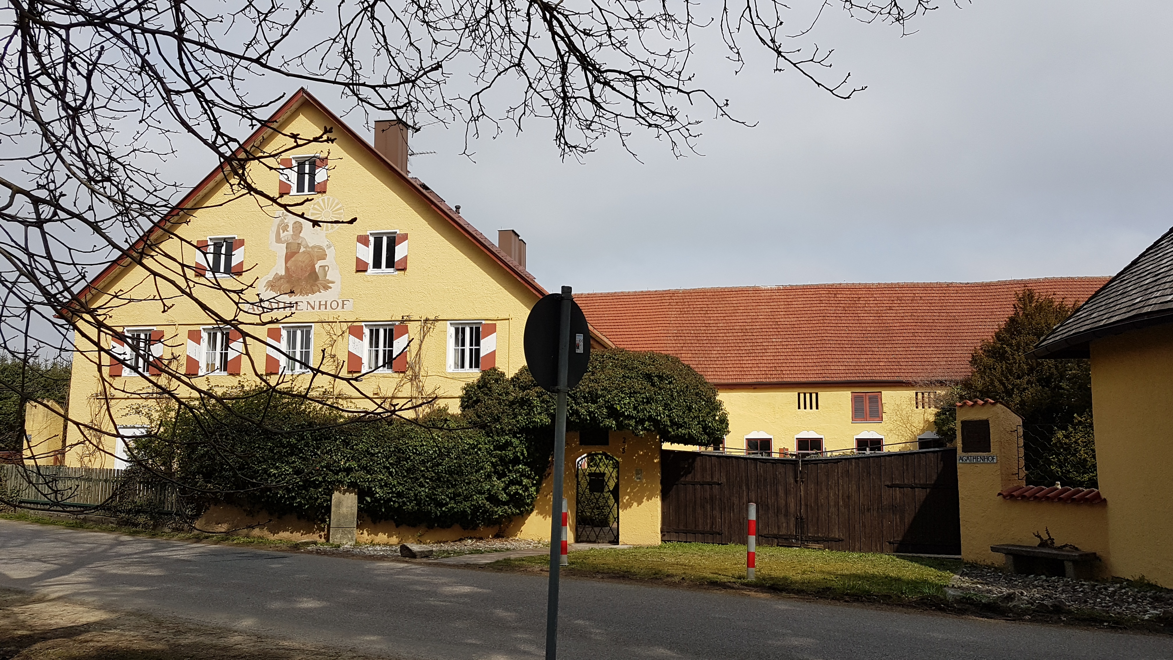 Wagelsried (Alling), Agathenhof - ein herrschaftlicher Gutshof.